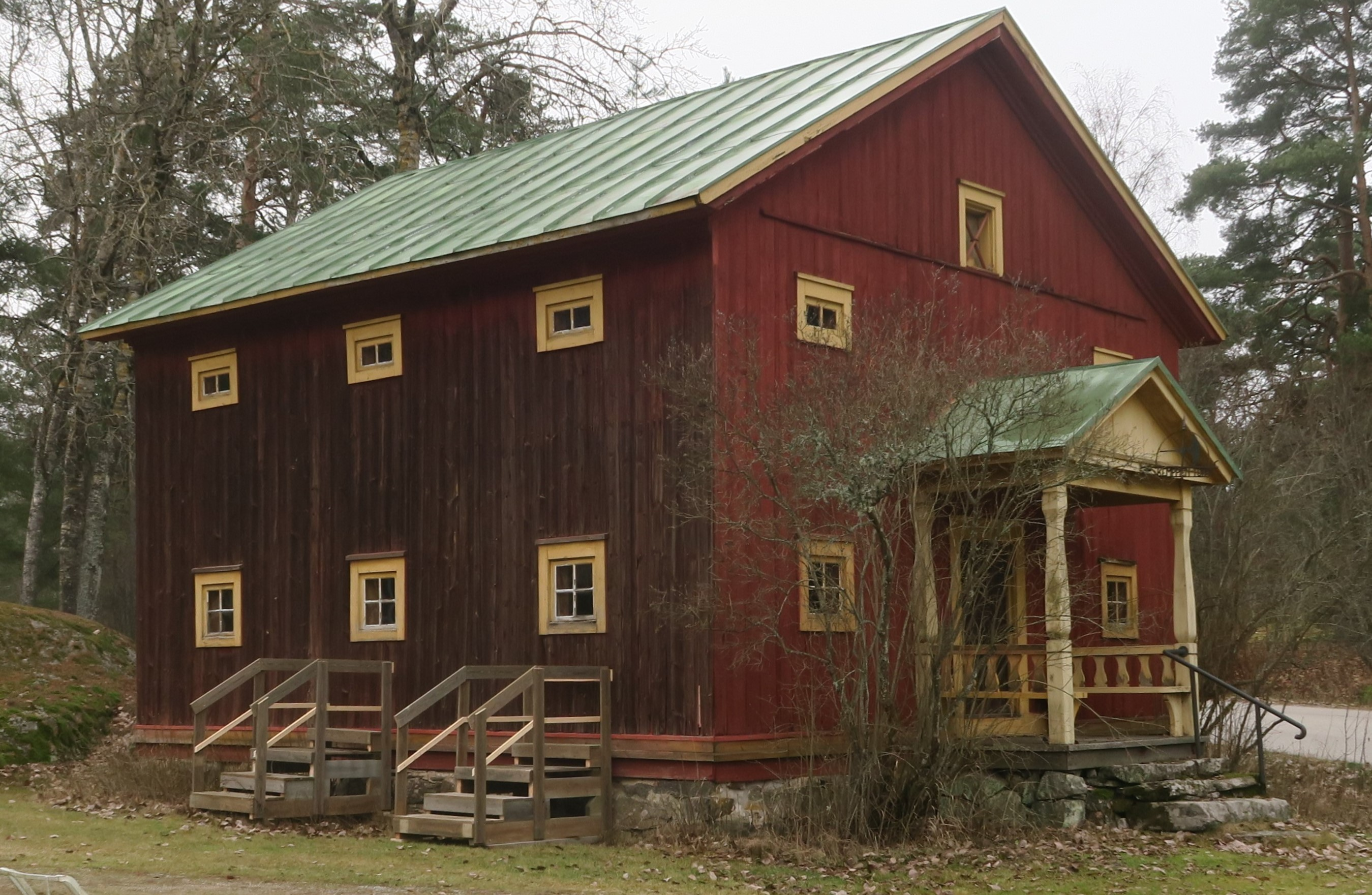 Kotiseutumuseo Kemppien tupa Lemussa Maskussa Lemun kirkon luona